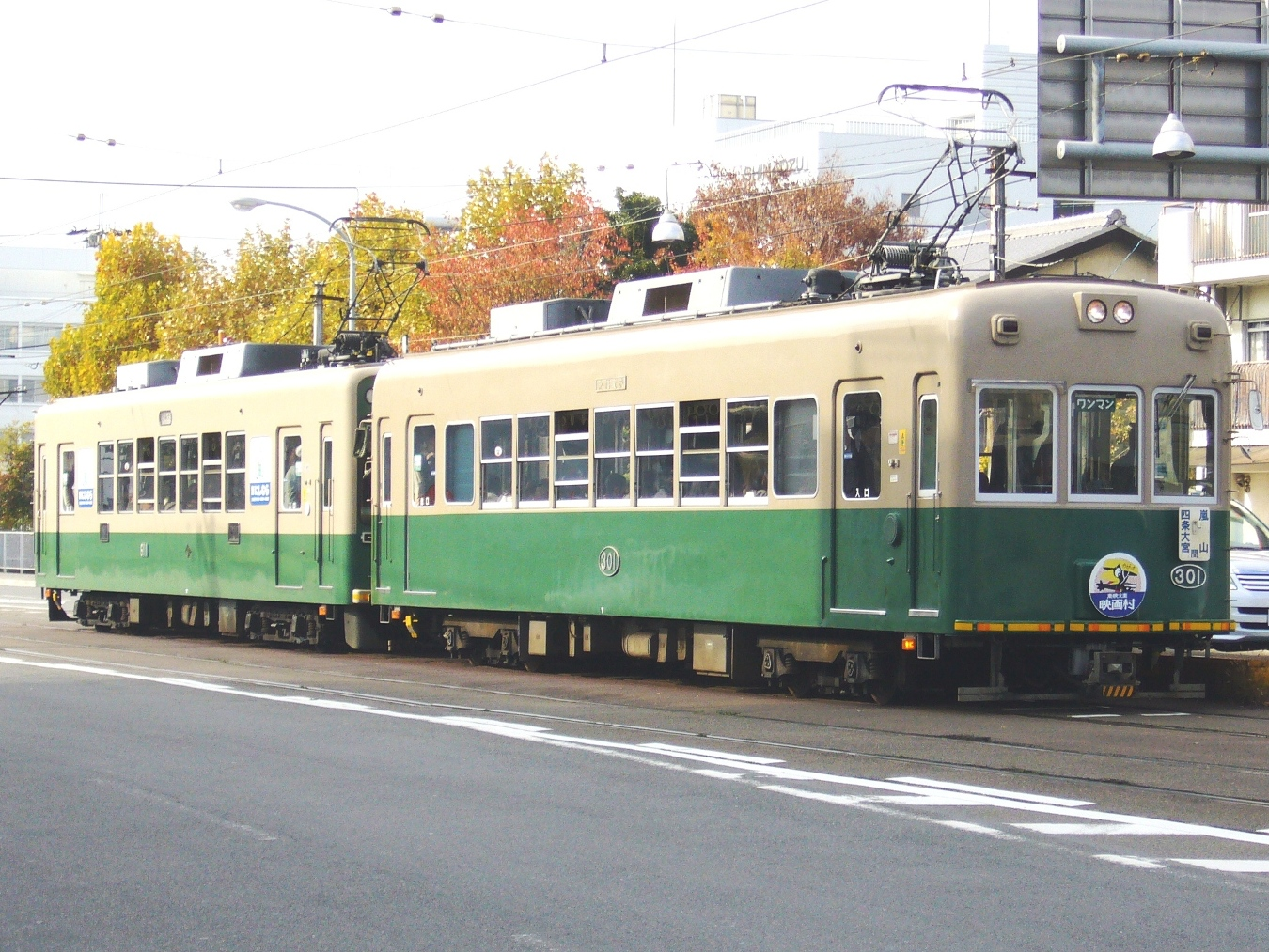 京福電気鉄道モボ301形301号車とモボ611形611号車。西大路三条駅の四条大宮駅方面行き電停に停車中の姿。